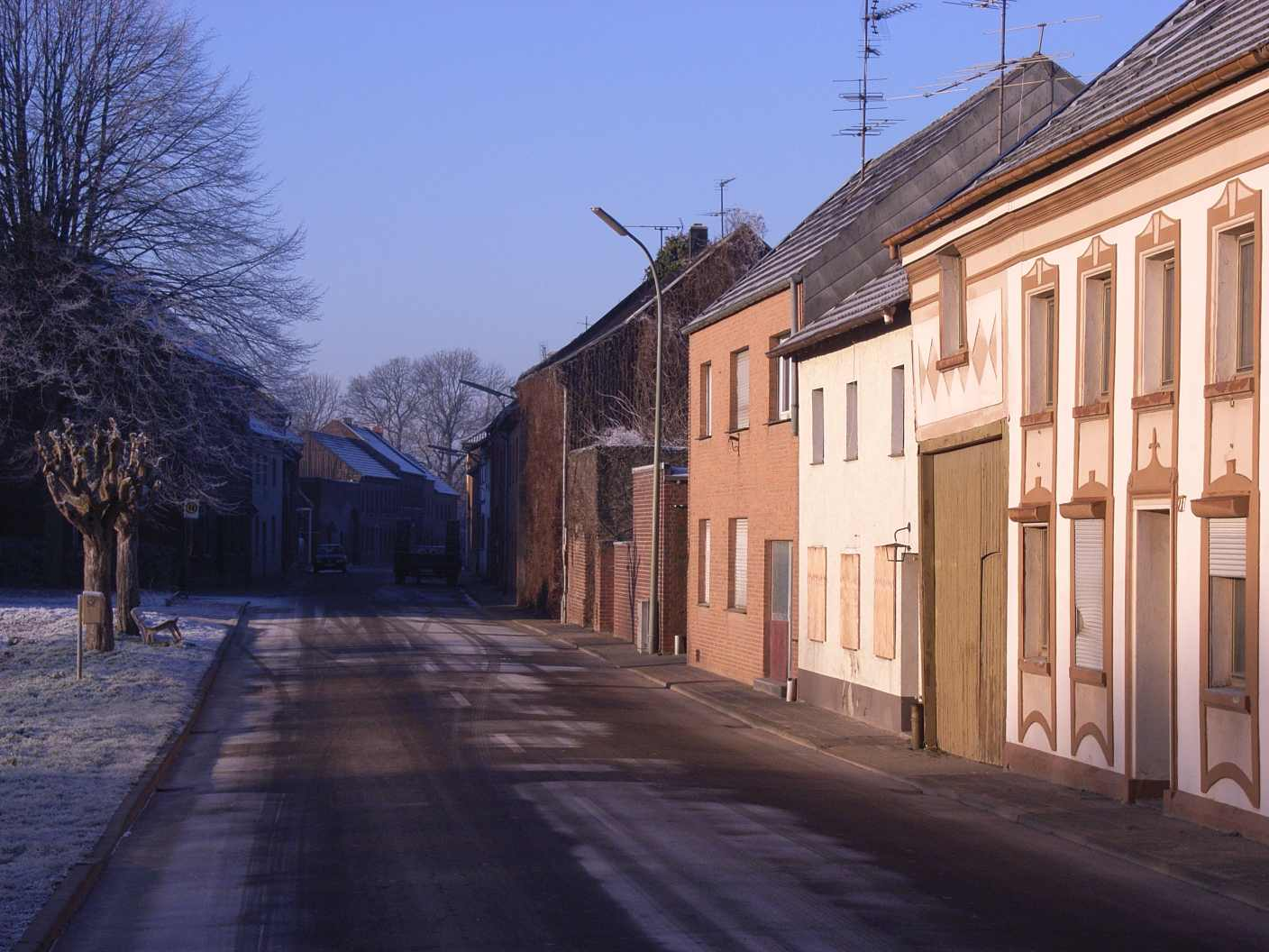 Verlassene Häuserzeile im Orstteil Pesch (Erkelenz, NRW)